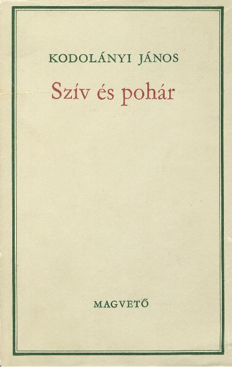 A Szív és pohár c. könyv borítója